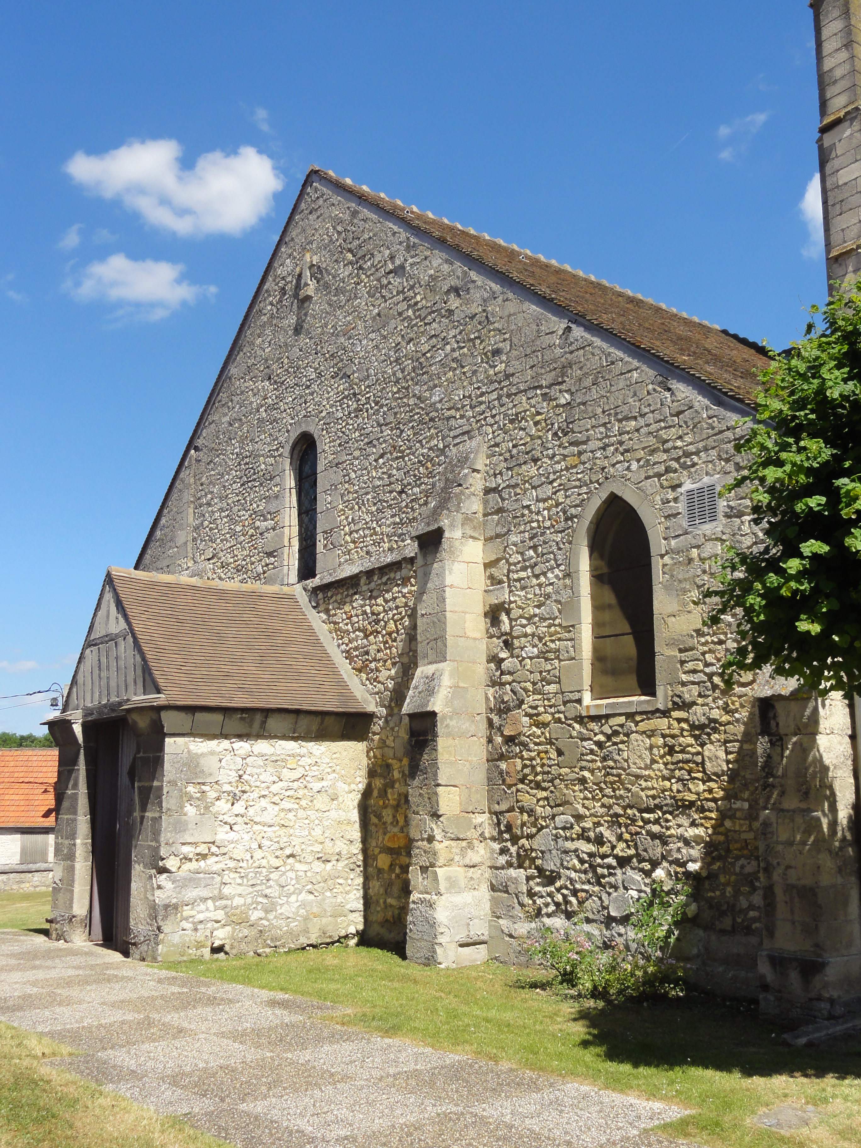 Église Saint-Martin de Venette, façade occidentale.